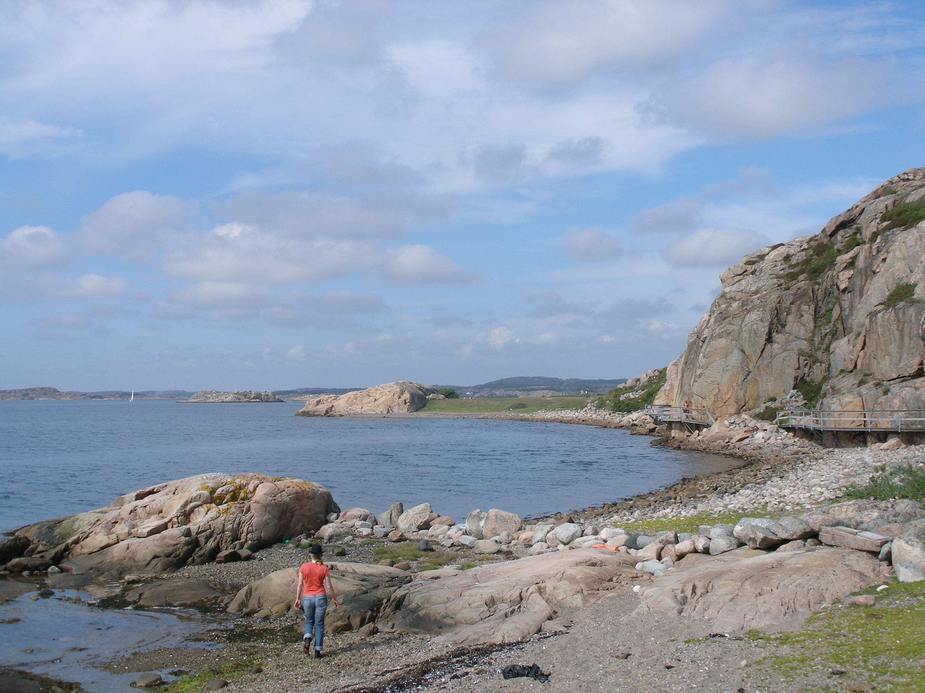 Veddö naturreservat. Sweden, June 2005.